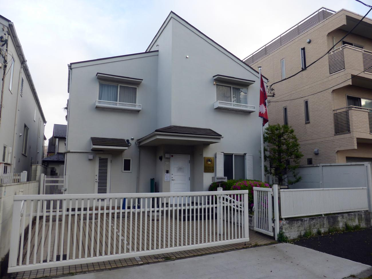 ネパール大使館全景